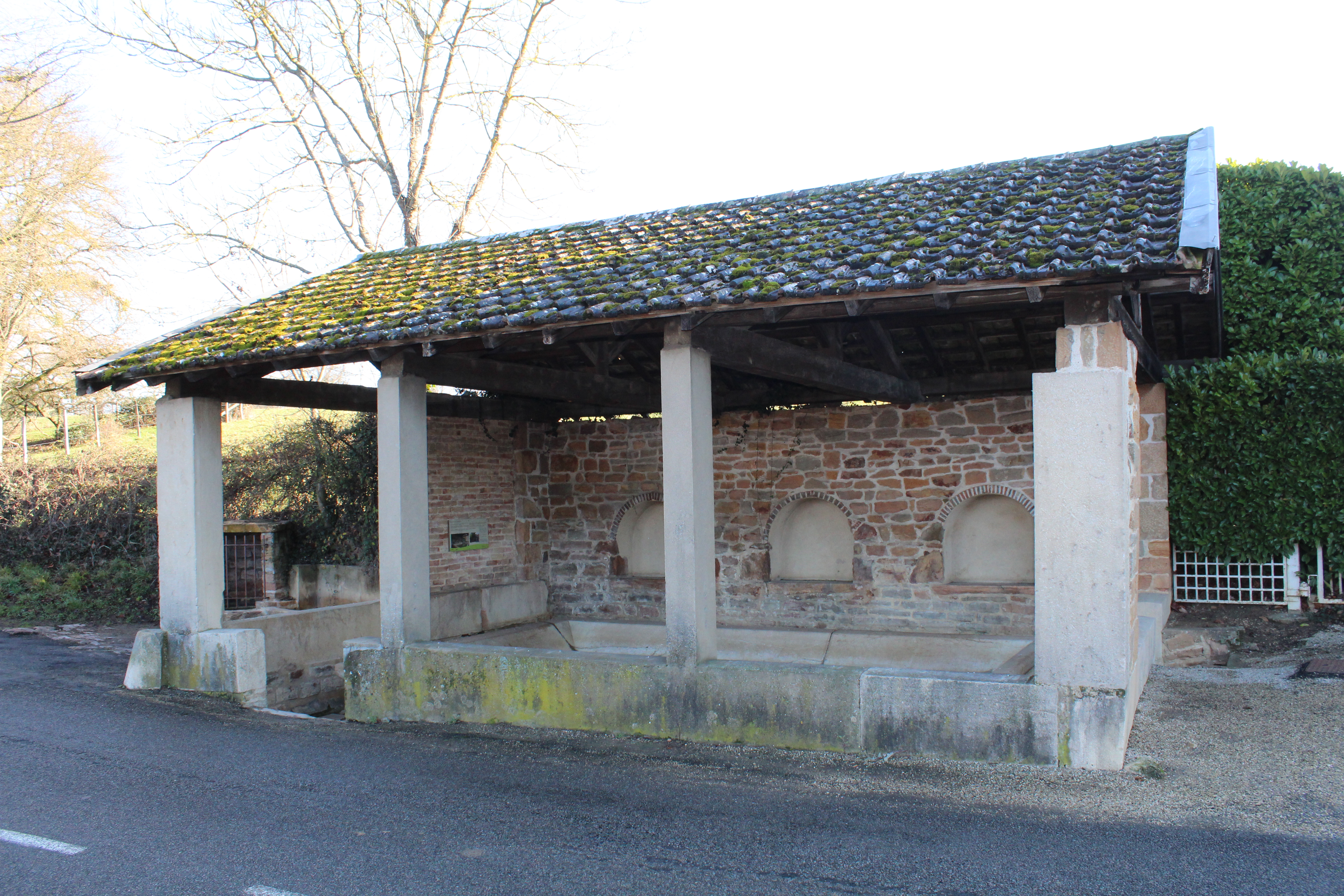 Lavoir du Voisinet à Charnay-lès-Mâcon.